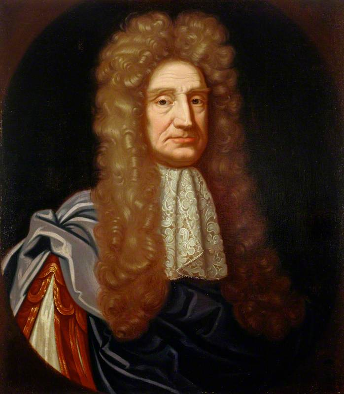 George Mackenzie